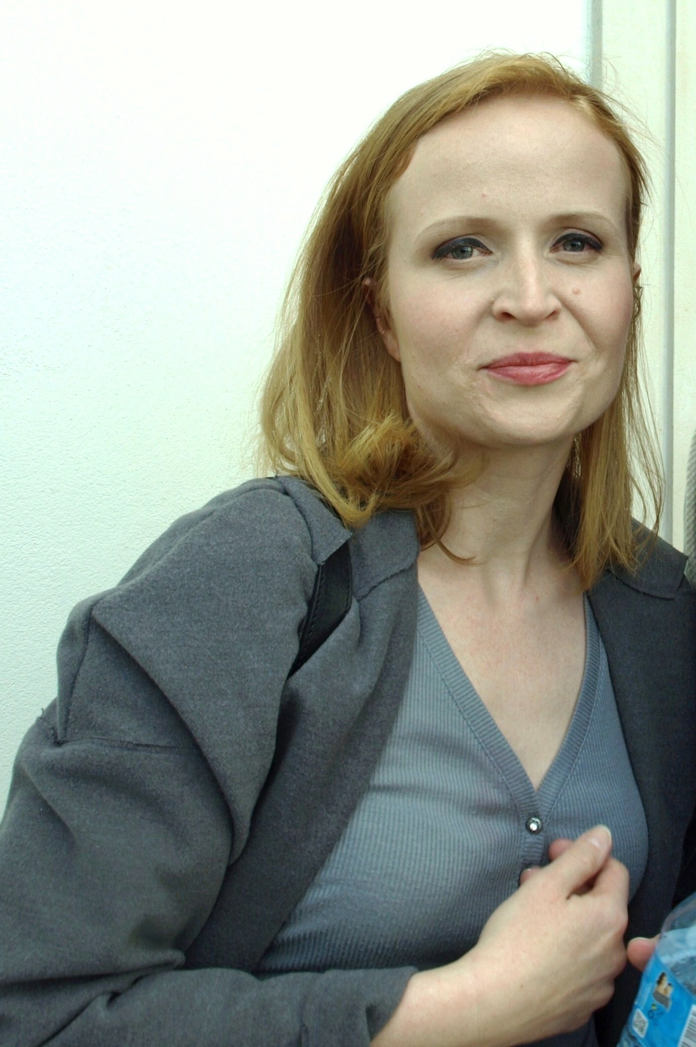 Aktorka Dominika Kluźniak.